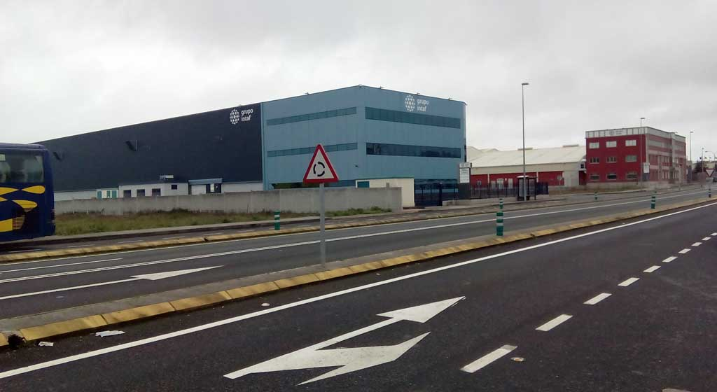 Instalacións de Intaf nas Lagoas, Narón.